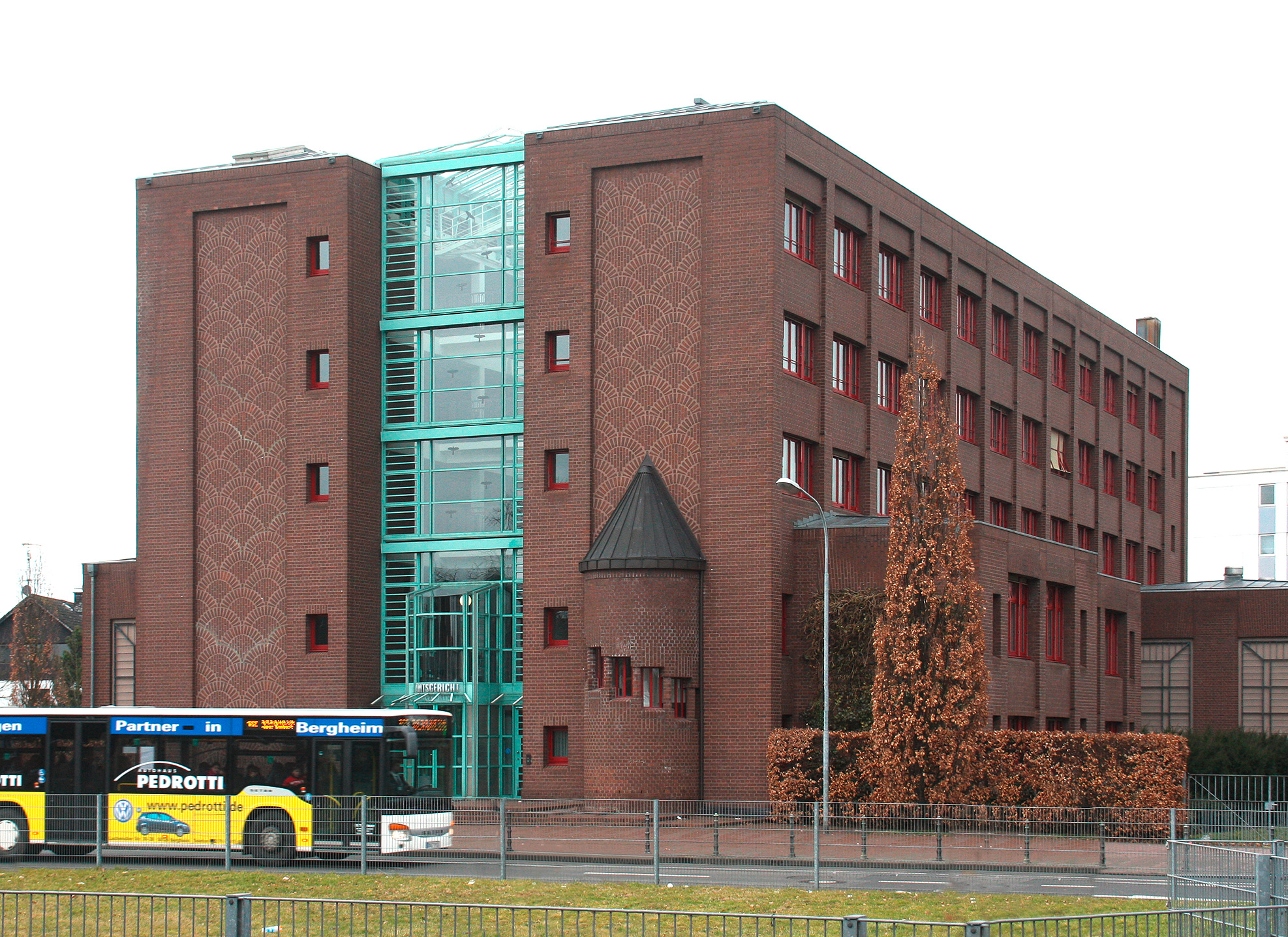 Gebäude des Amtsgerichts Kerpen, Architekt: Gottfried Böhm